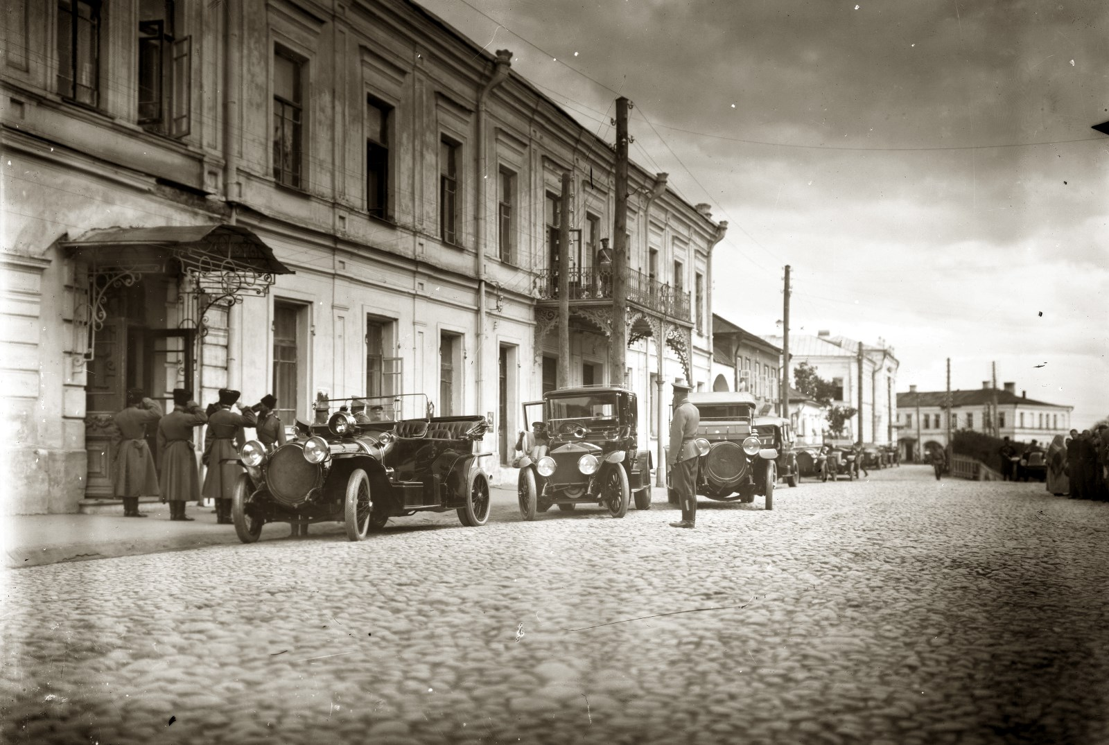 Беларуская (тарашкевіца): Магілёў (Mahiloŭ), вуліца Шляхецкая (vulica Šlachieckaja). Гатэлі Брысталь і Вена